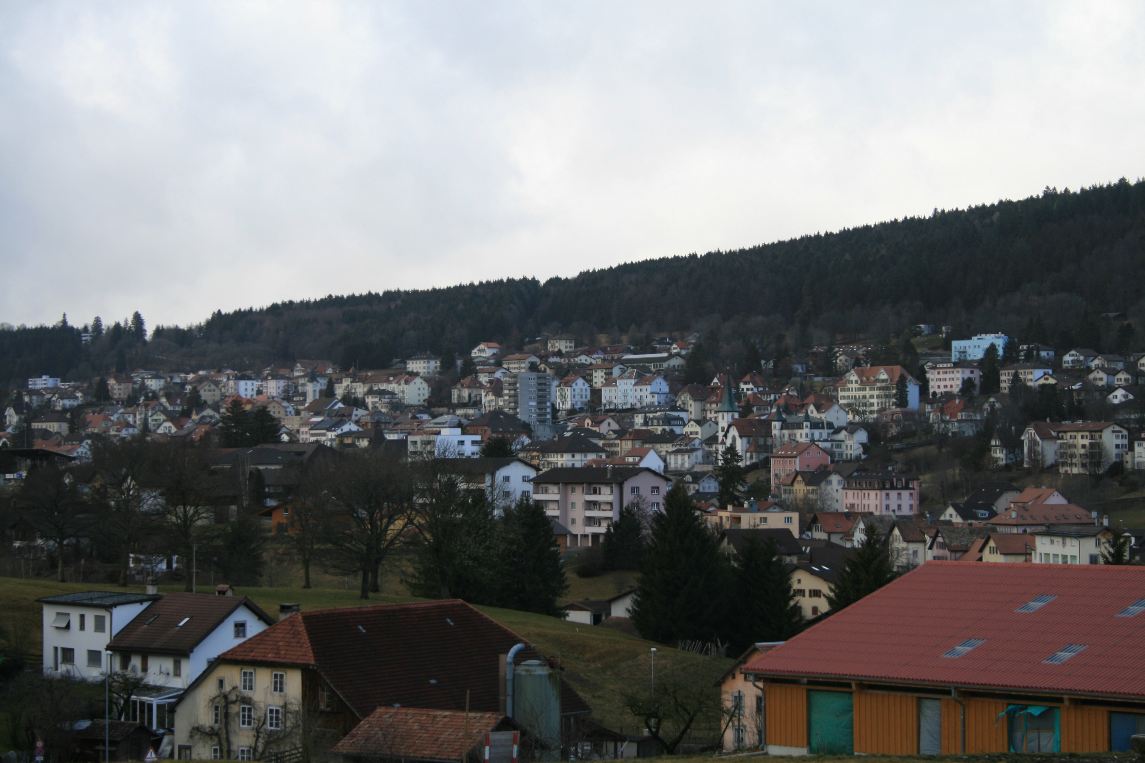 Blick auf Tramelan BE